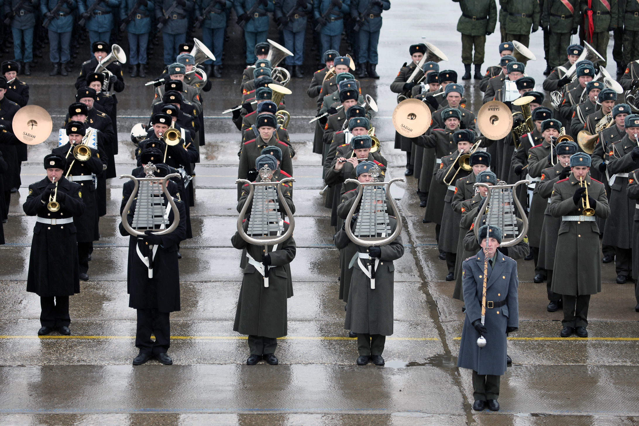 Оркестр